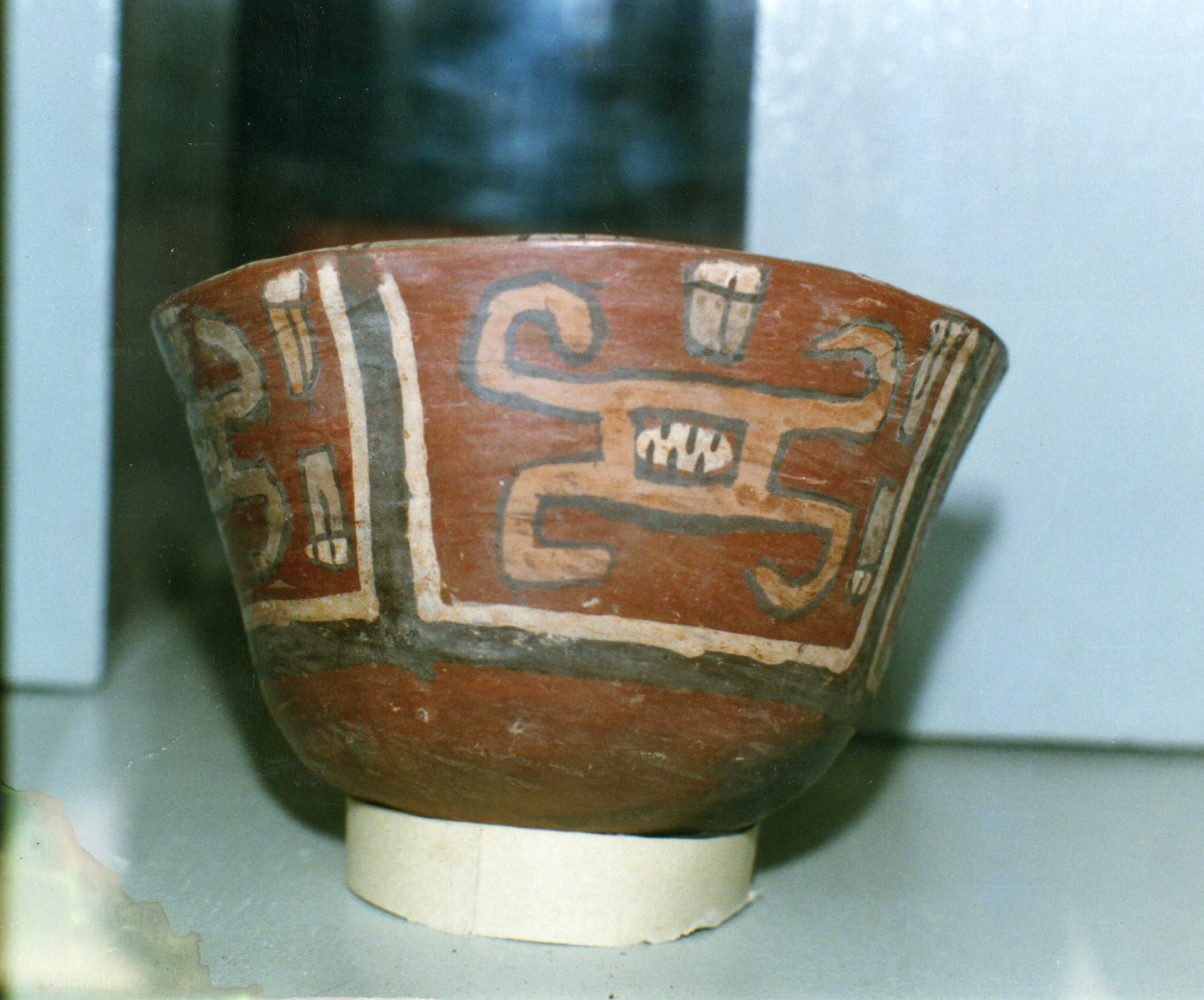 el museo de aplao